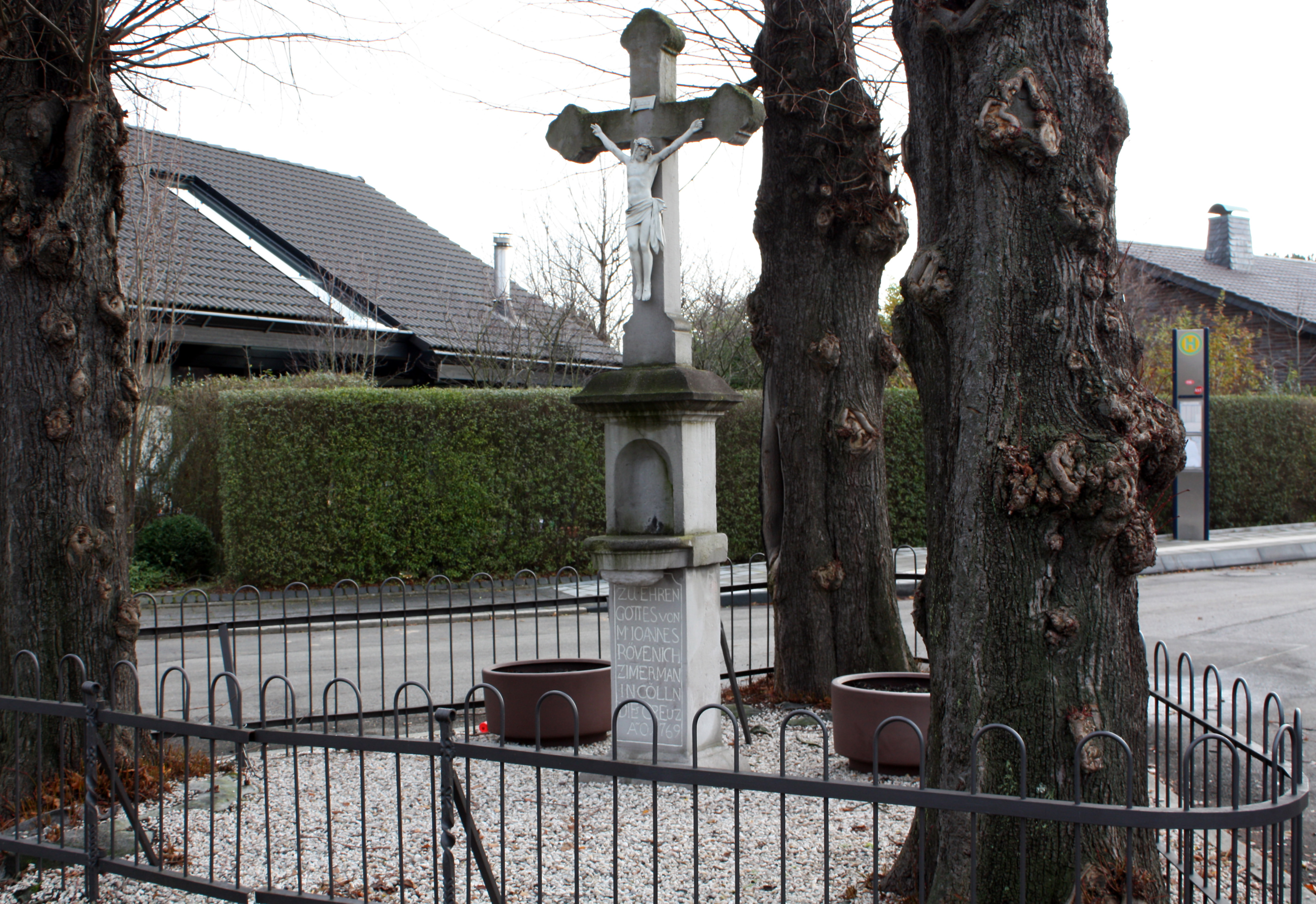 Hürth-Stotzheim, Wegekreuz von 1769